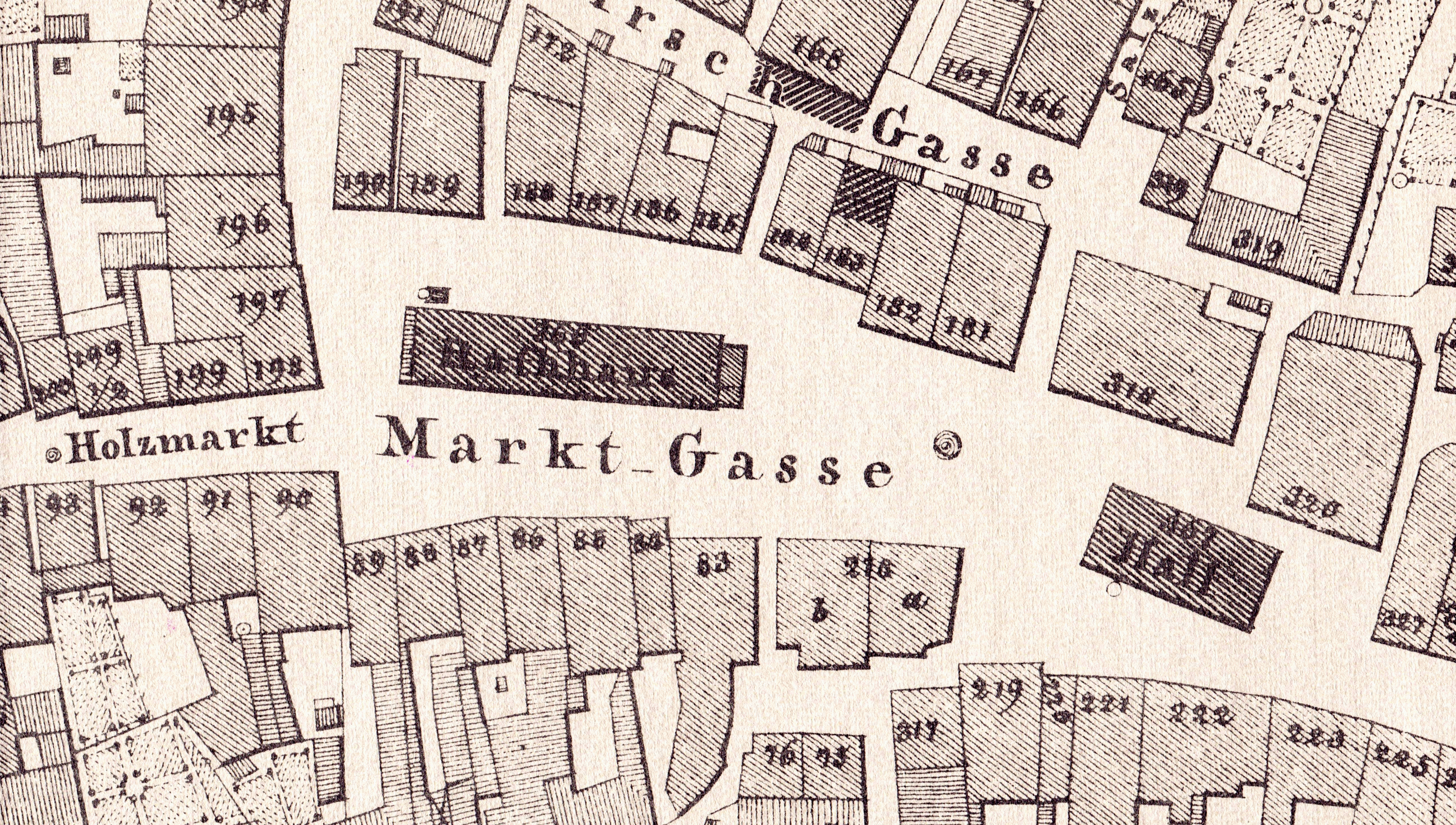 Ausschnitt aus dem Urkataster der Stadt Kempten 1826 (vermessen 1823)